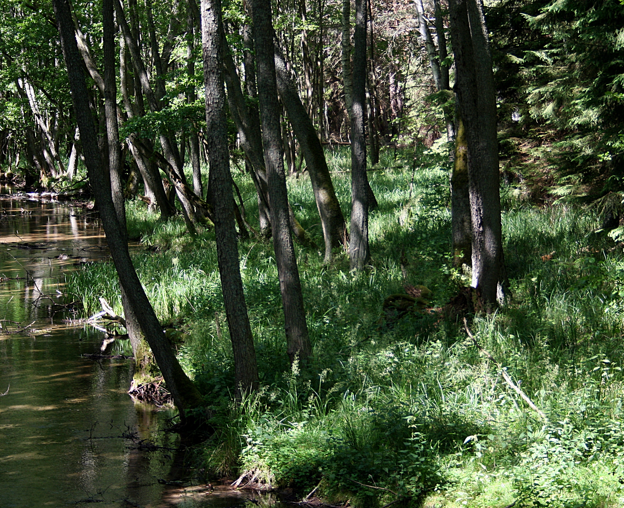 Ols porzeczkowy w Parku Narodowym Bory Tucholskie